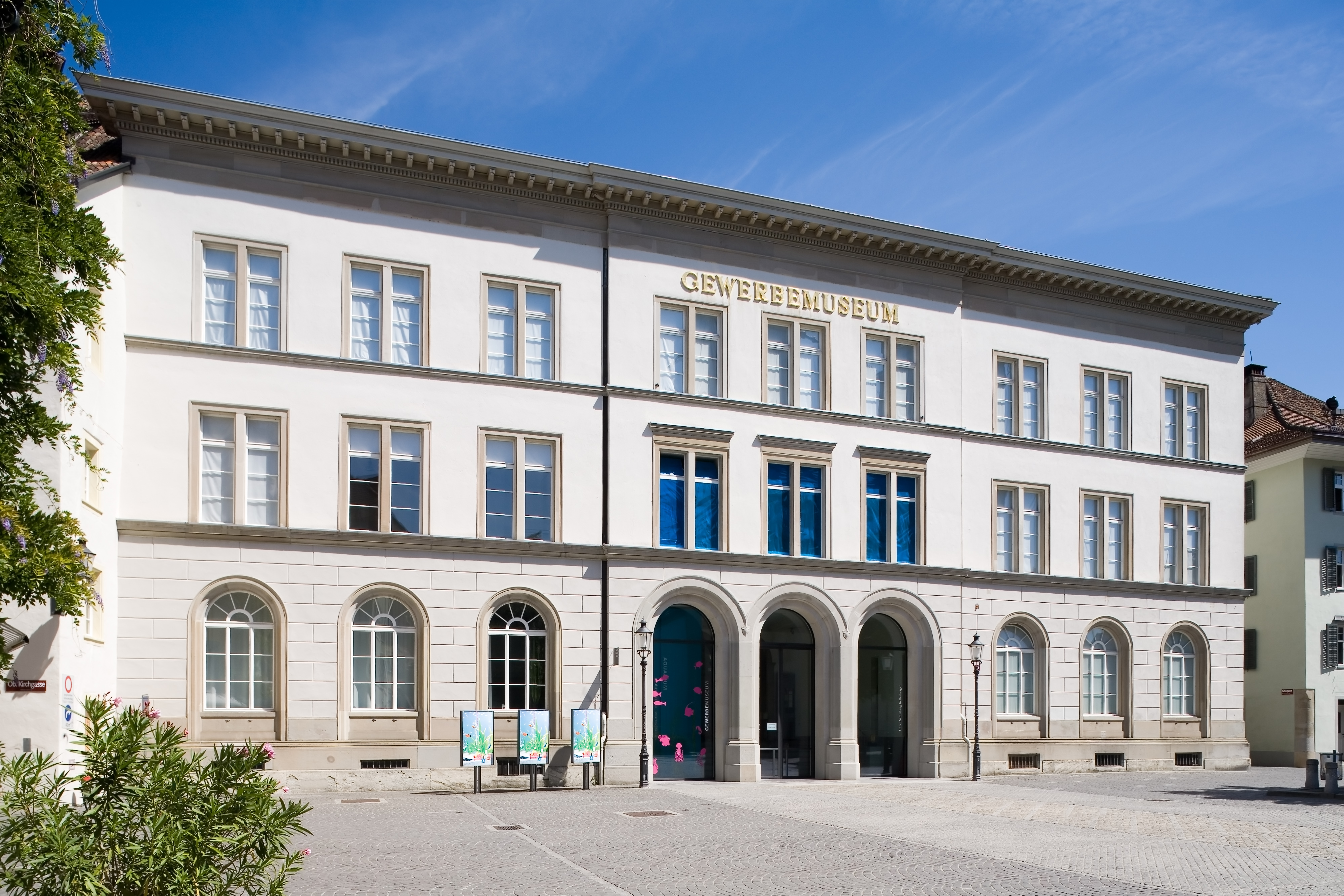 Die ehemalige Mädchenschule am Kirchplatz in Winterthur, Schweiz. Heute beherbergt das Gebäude das Gewerbemuseum. Erbaut 1849–1852 nach Plänen Ferdinand Stadlers.